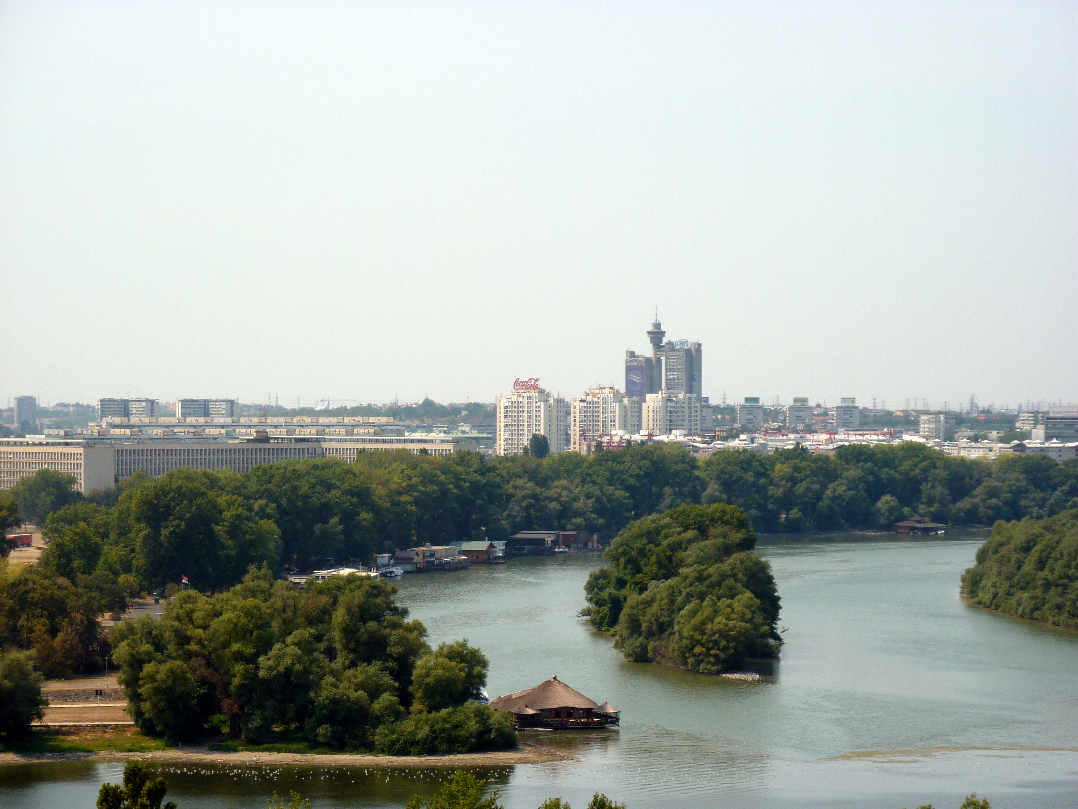 Seen from inside Beogradska tvrđava, Belgrade, Serbia.